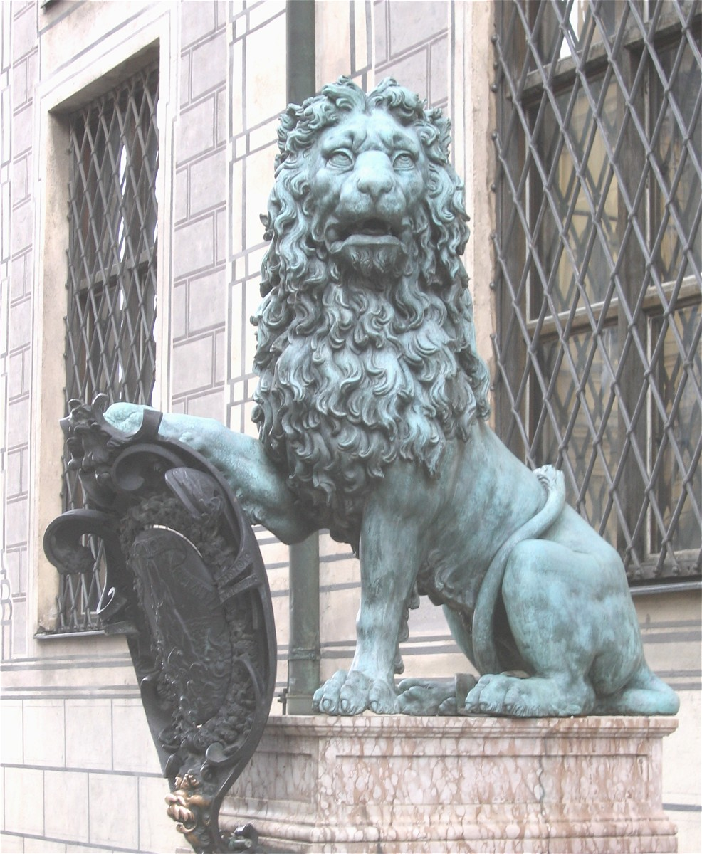 Münchner Residenz, Bronzelöwe vor dem Eingang zum Kapellenhof und unter der Bronzestatue von Fortitudo. Wappenschild mit Inschrift „DIFFRACTAS LONGE REMITTIT“ („Die gebrochenen wirft er weit zurück“).